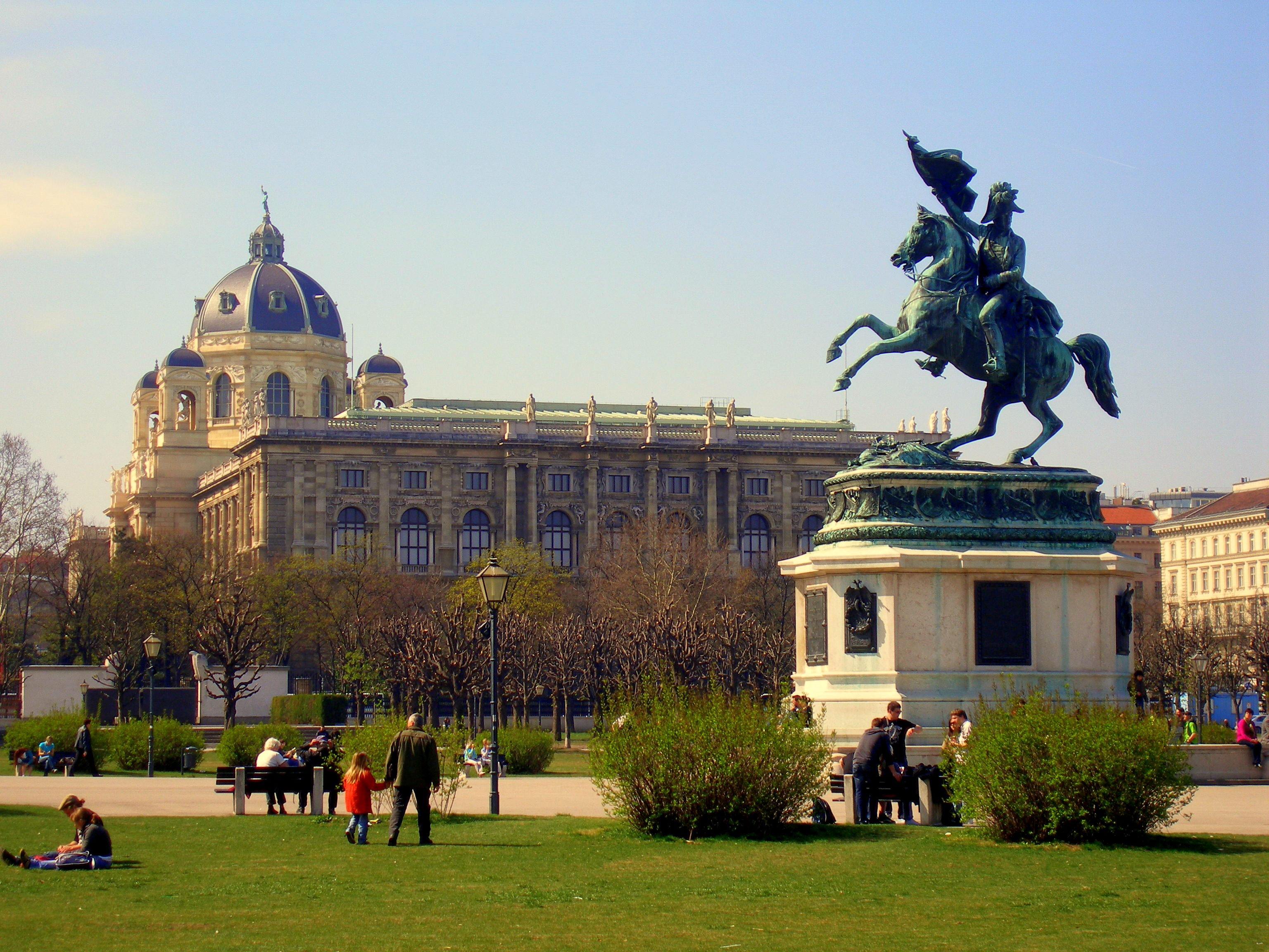 Okolie Hofburgu vo Viedni.